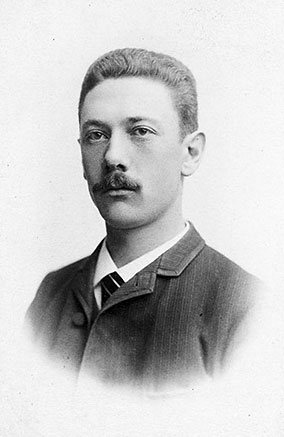 Tor Hedberg